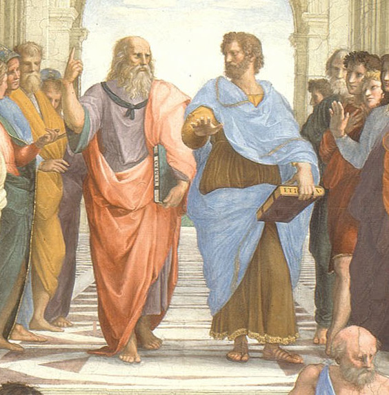 Scuola di AteneThe School of Athenstitle QS:P1476,it:"Scuola di Atene" label QS:Lit,"Scuola di Atene" label QS:Les,"La escuela de Atenas." label QS:Len,"The School of Athens" label QS:Lel,"Η Σχολή των Αθηνών"